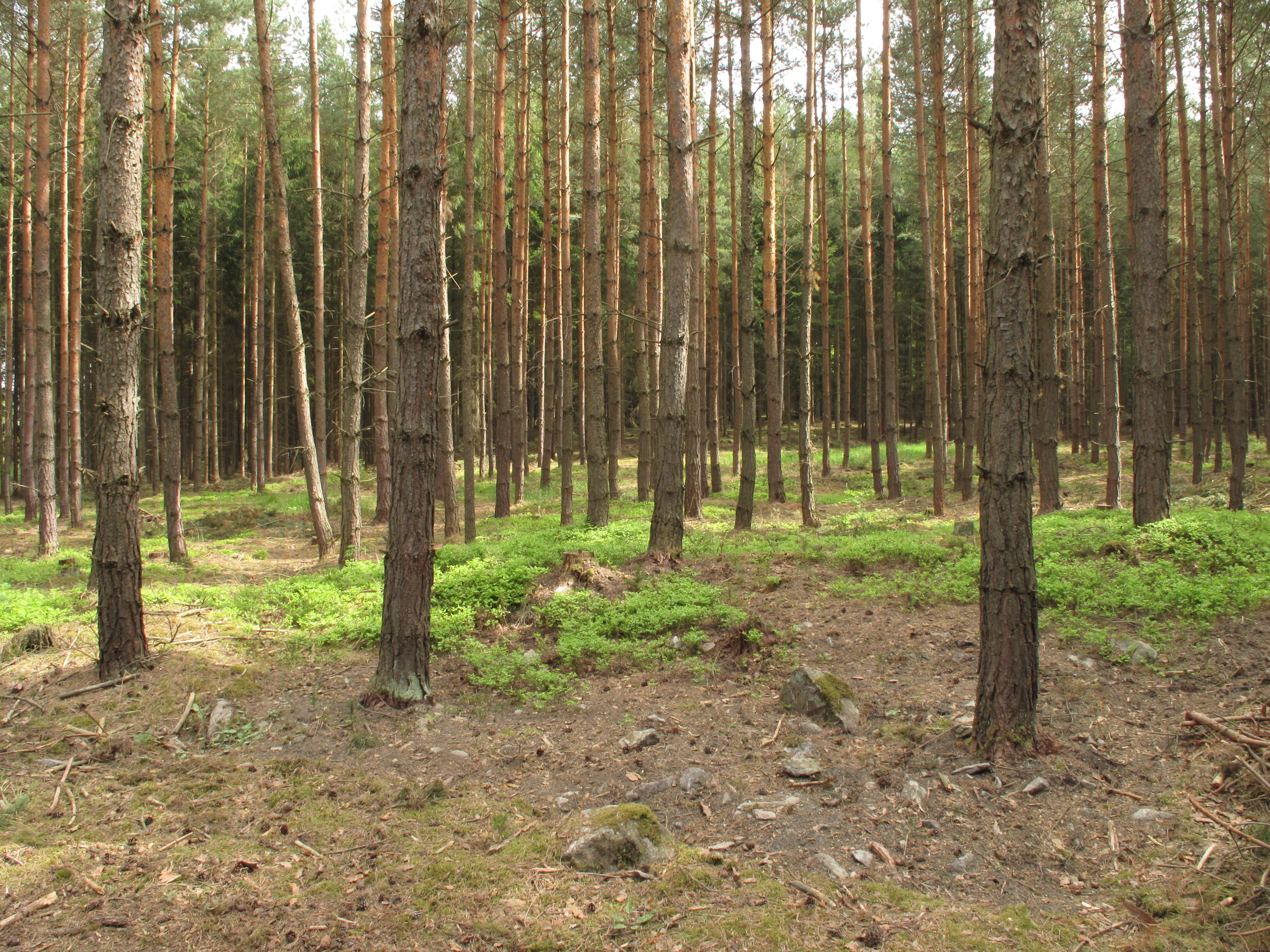 Hadce u Hrnčíř. Okres Benešov, Česká republika.